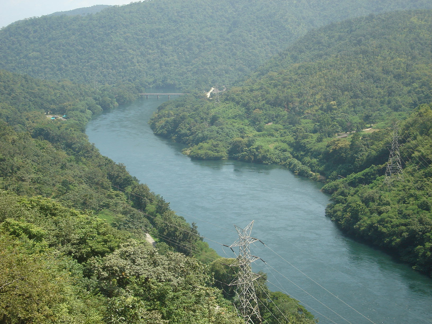 Ping river after Bhumibol dam